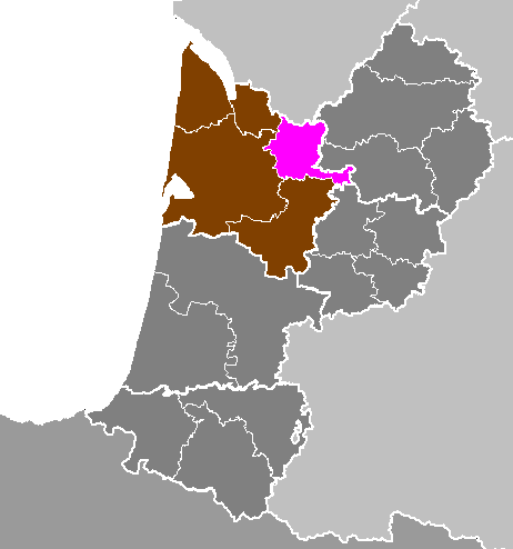 Maps of arrondissements and cantons of France: Département de la Gironde - Arrondissement de Libourne.PNG (Région Aquitaine)